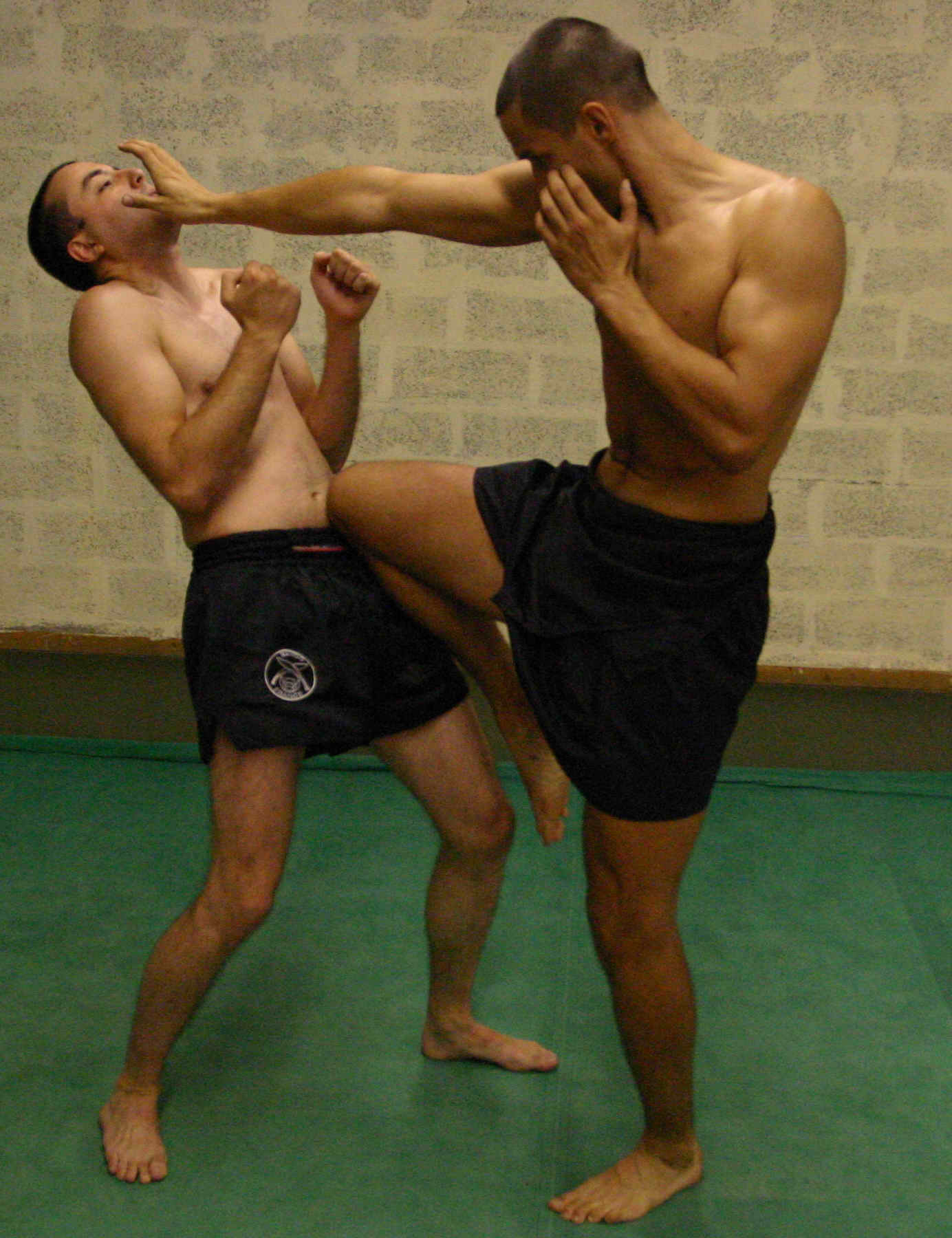 Lethwei-Knee-Hand.jpg